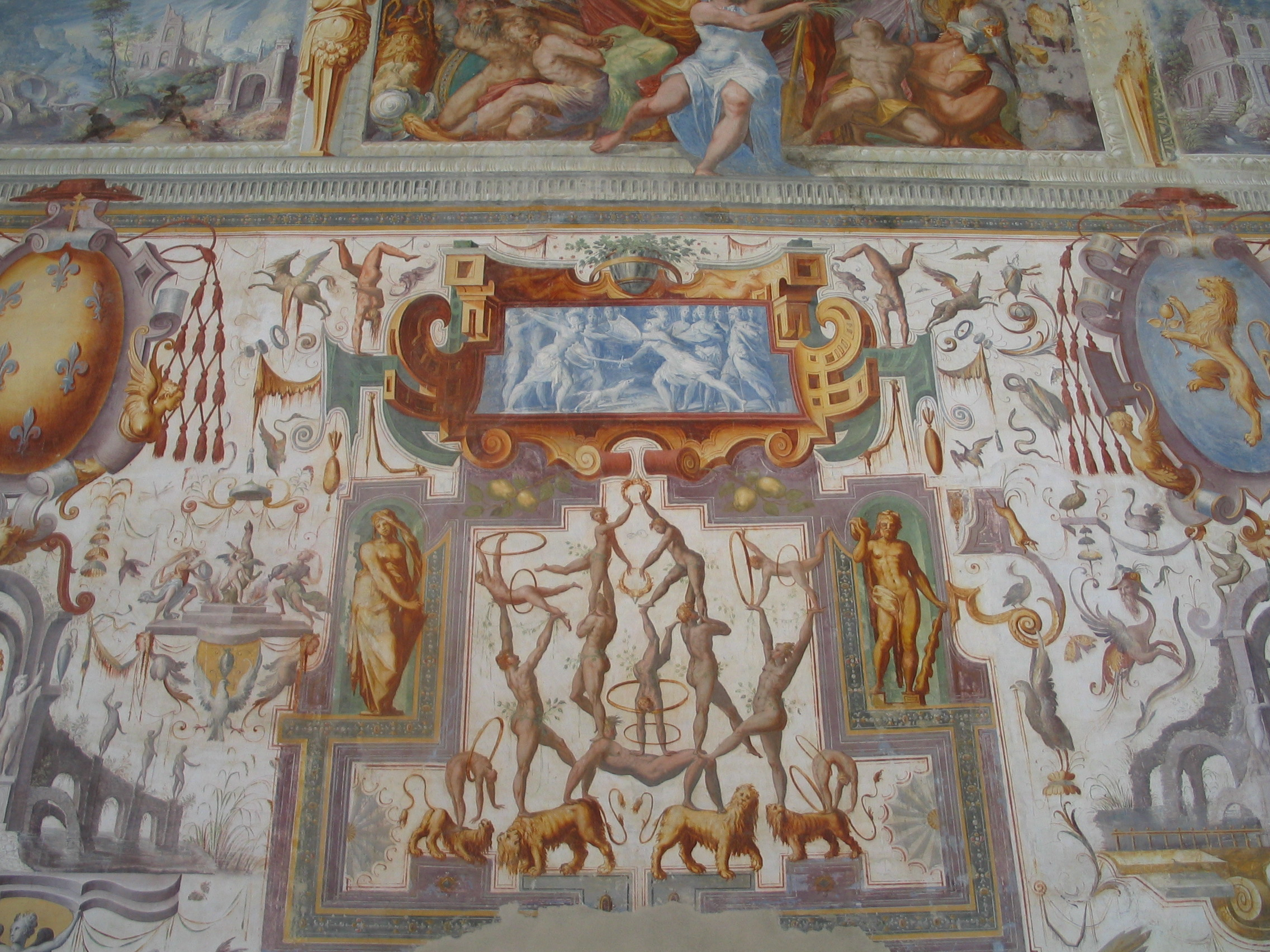 Castello di Torrechiara - MIBAC This is a photo of a monument which is part of cultural heritage of Italy.